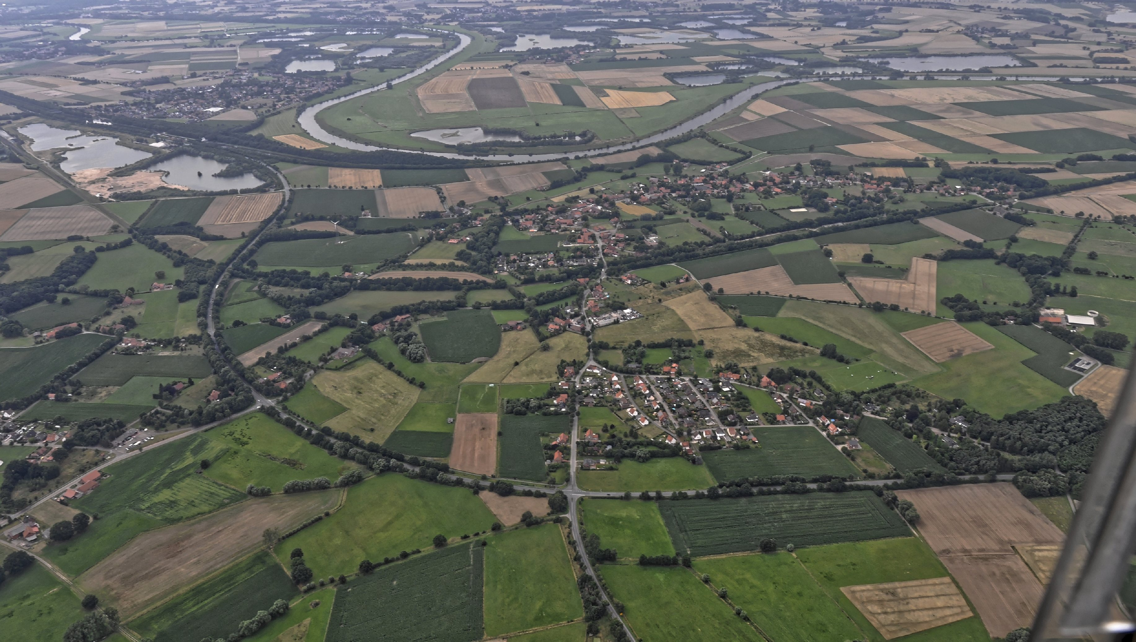 Bilder vom Flug Nordholz-Hammelburg 2015: Döhren (Petershagen). Im oberen Bildteil die Weser. Links oben Windheim zwischen ausgedehnten Kiesteichen. Links und im Vordergrund die langezogene Kurve der Bundesstraße 482.